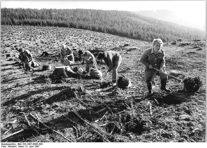 Luisenthal, Aufforstung Zum Beitrag: Nachwuchs für den Thüringer Wald - Tausende junge Fichten im Forstgebiet Einkenbrunnen ADN-ZB Hirndorf 5.6.1987-bg Wiederaufforstungsarbeiten im 720 m hoch gelegenen Forstgebiet Rinkenbrunnen bei Luisenthal im Bezirk Erfurt. Hier werden auf einer Fläche von ca. zwei Hektar 7.600 fünfjähriger kleiner Fichten gepflanzt. (Hierzu gehörne die Fotos 1987-0605-300N-302N!)